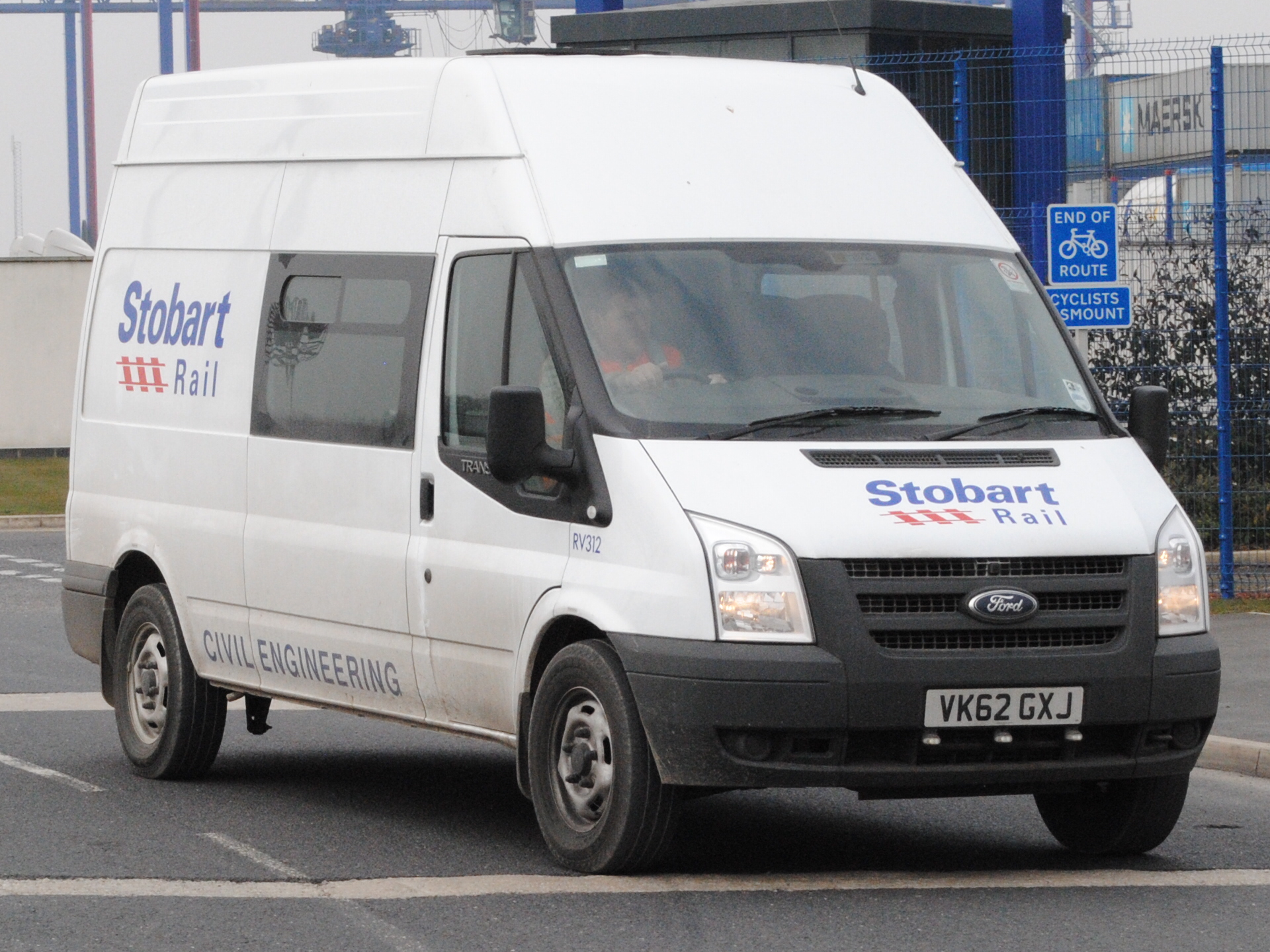 Ford Transit Stobart Rail Van. seen here in Widnes